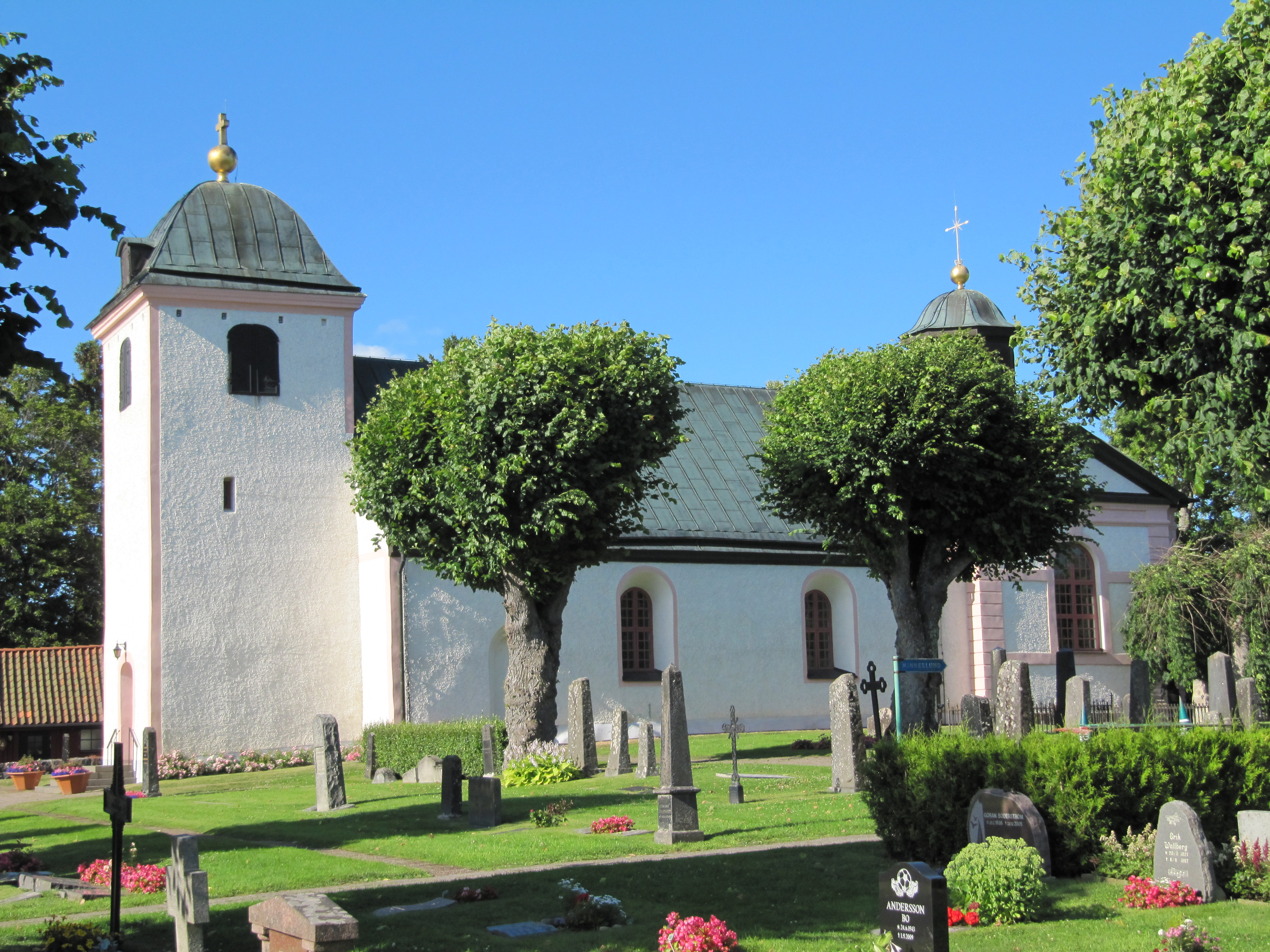 Flens kyrka